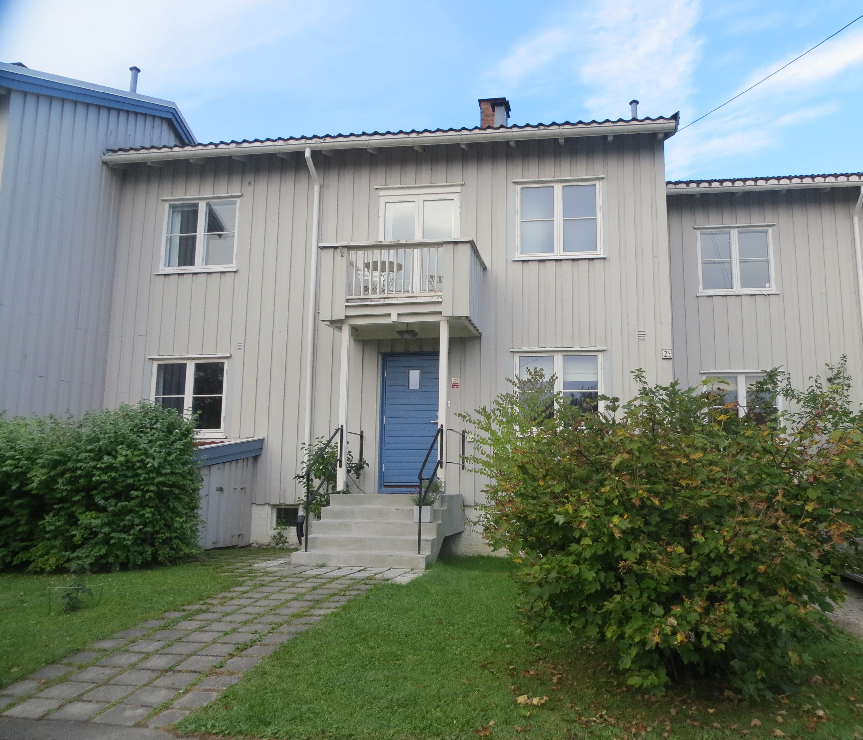 Lærer Holes vei i Husebygrenda, et boligområde som i sin helhet har lokalt listeført bygningsvern. Bydel Vestre Aker, Oslo.